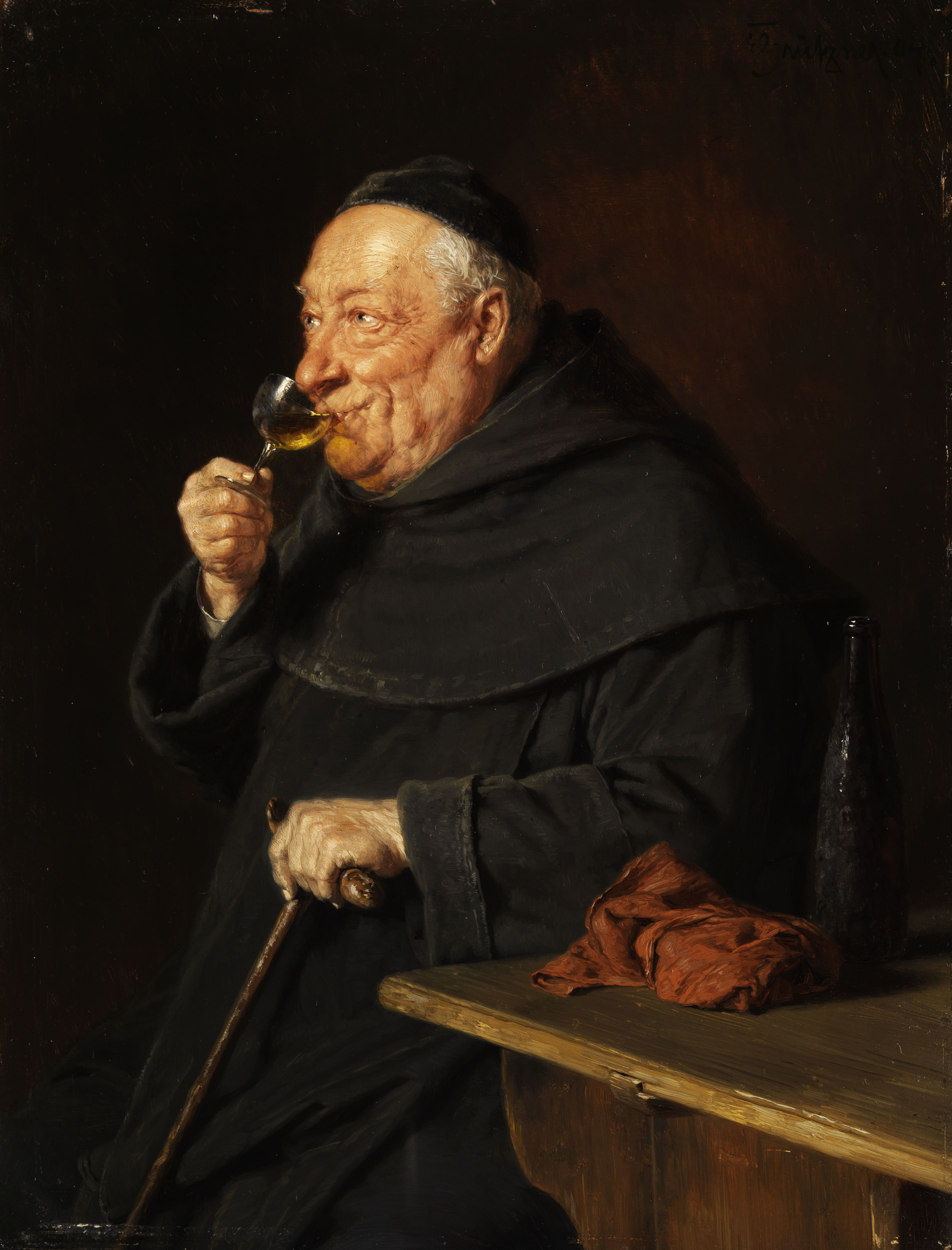 Benediktinermönch mit Wein beim Frühschoppen, Öl auf Holz, 33 x 25 cm, rechts oben signiert.